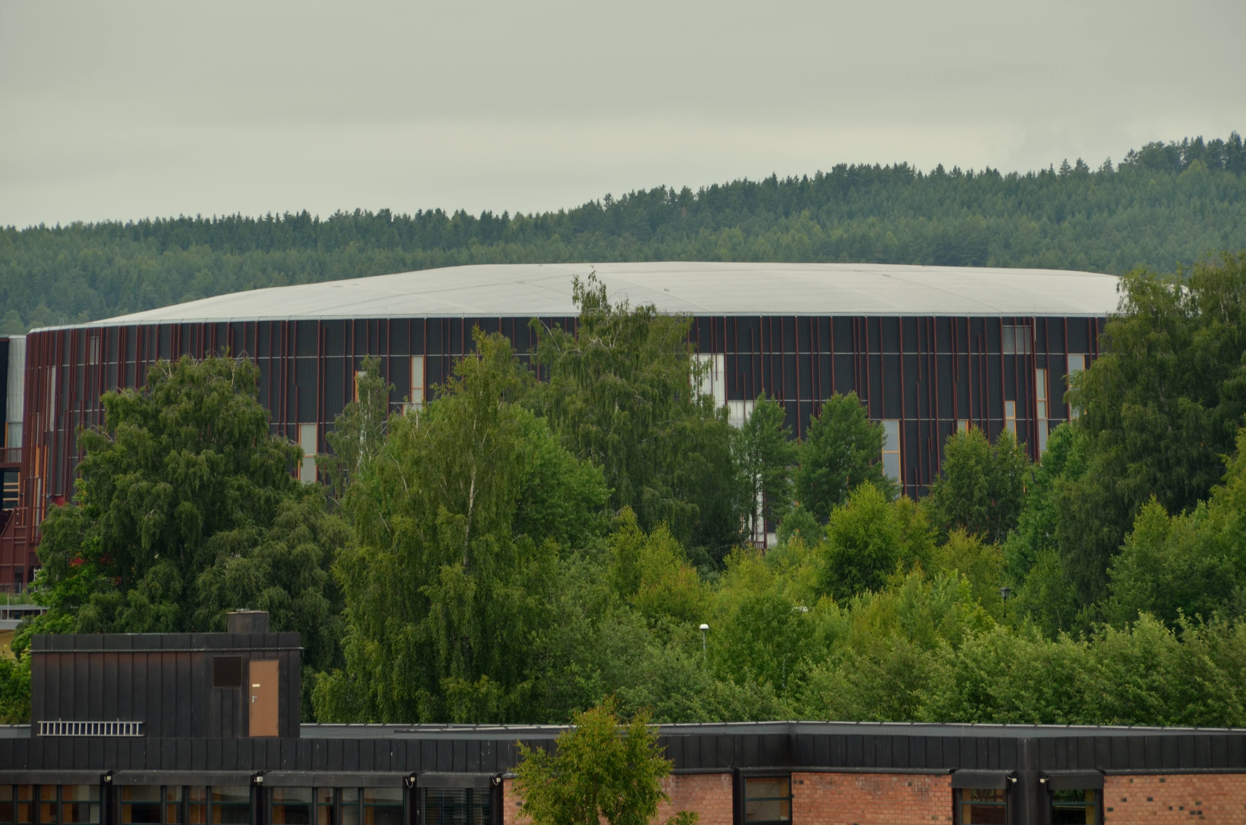 Arena